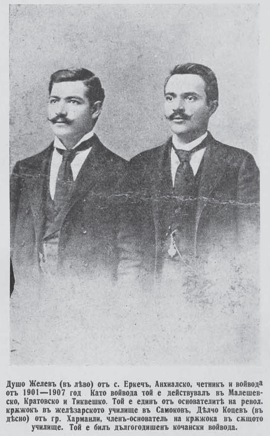 Dusho Zhelev and Delcho Kotsev